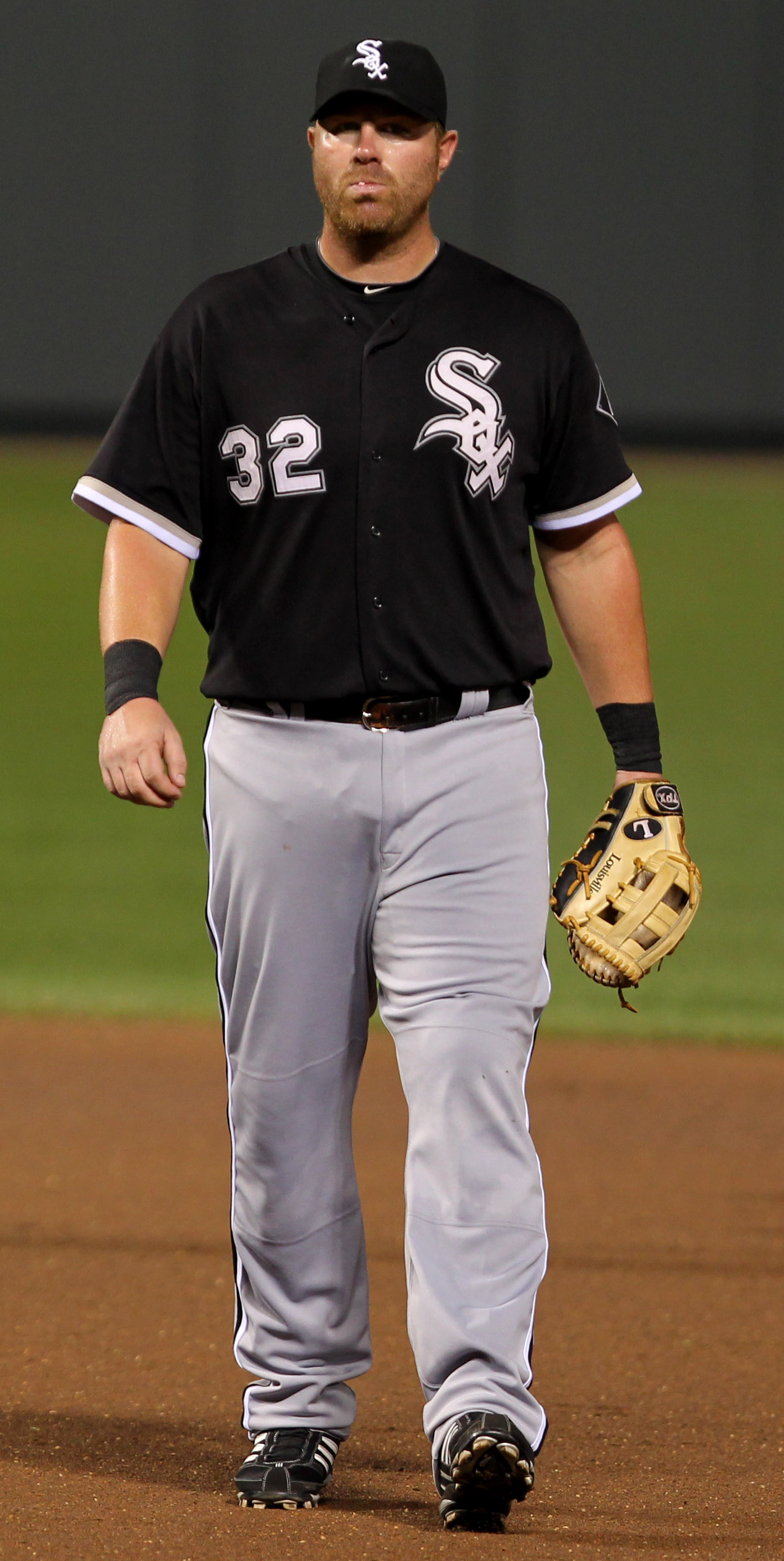 Adam Dunn